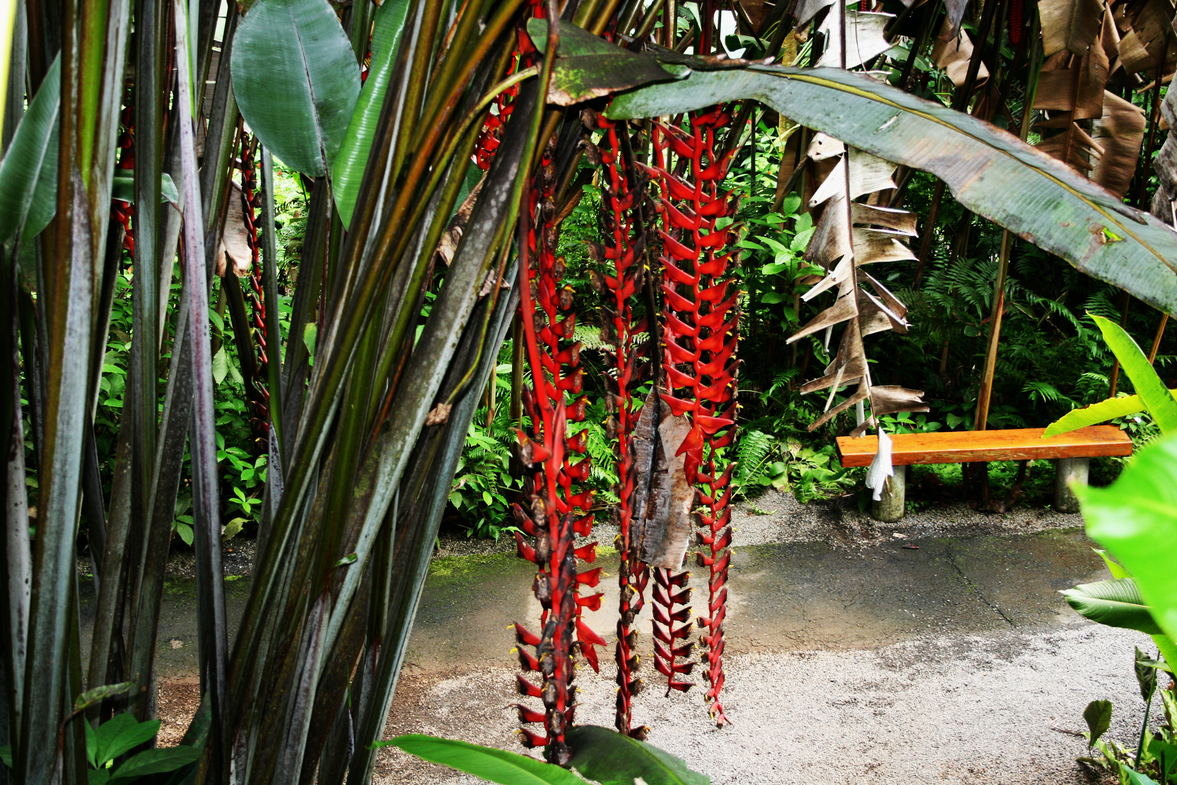 Heliconia